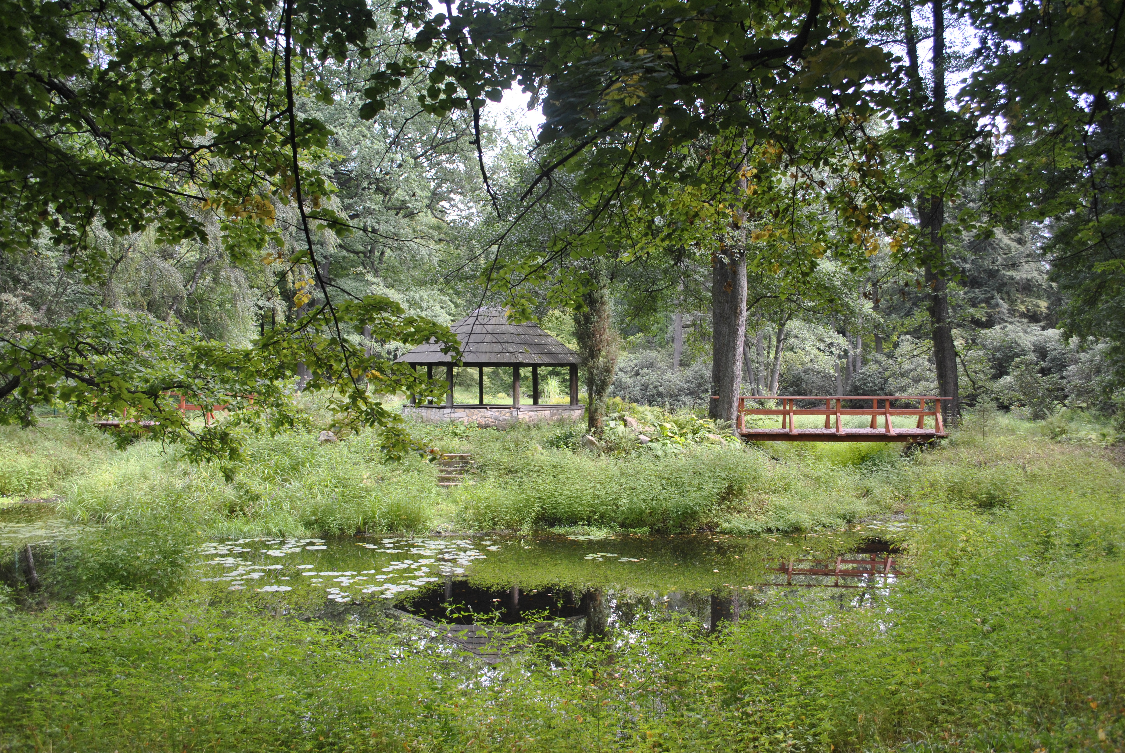 Brynek, park z ogrodem botanicznym, XIX/XX w.